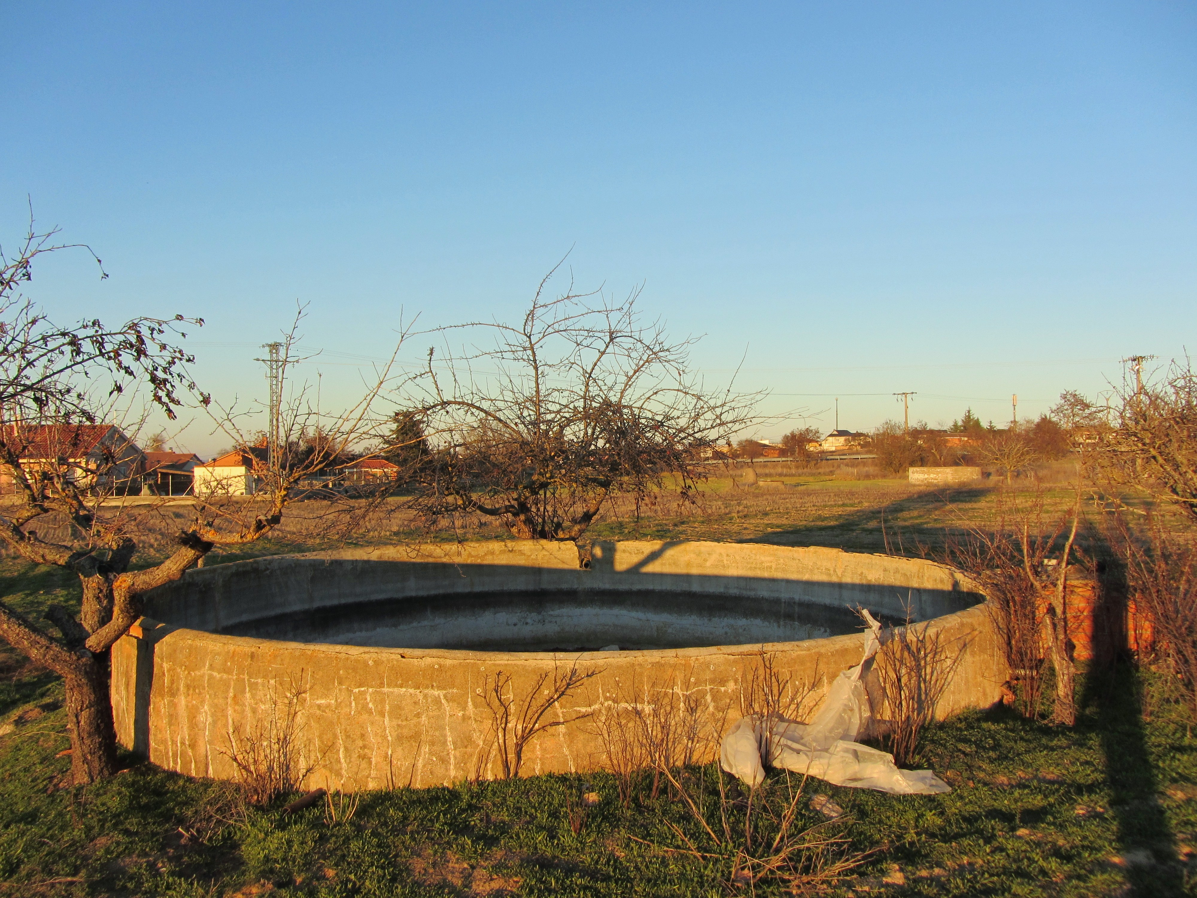 Buchina en una tierra de cultivo en Morales del Vino (Zamora)